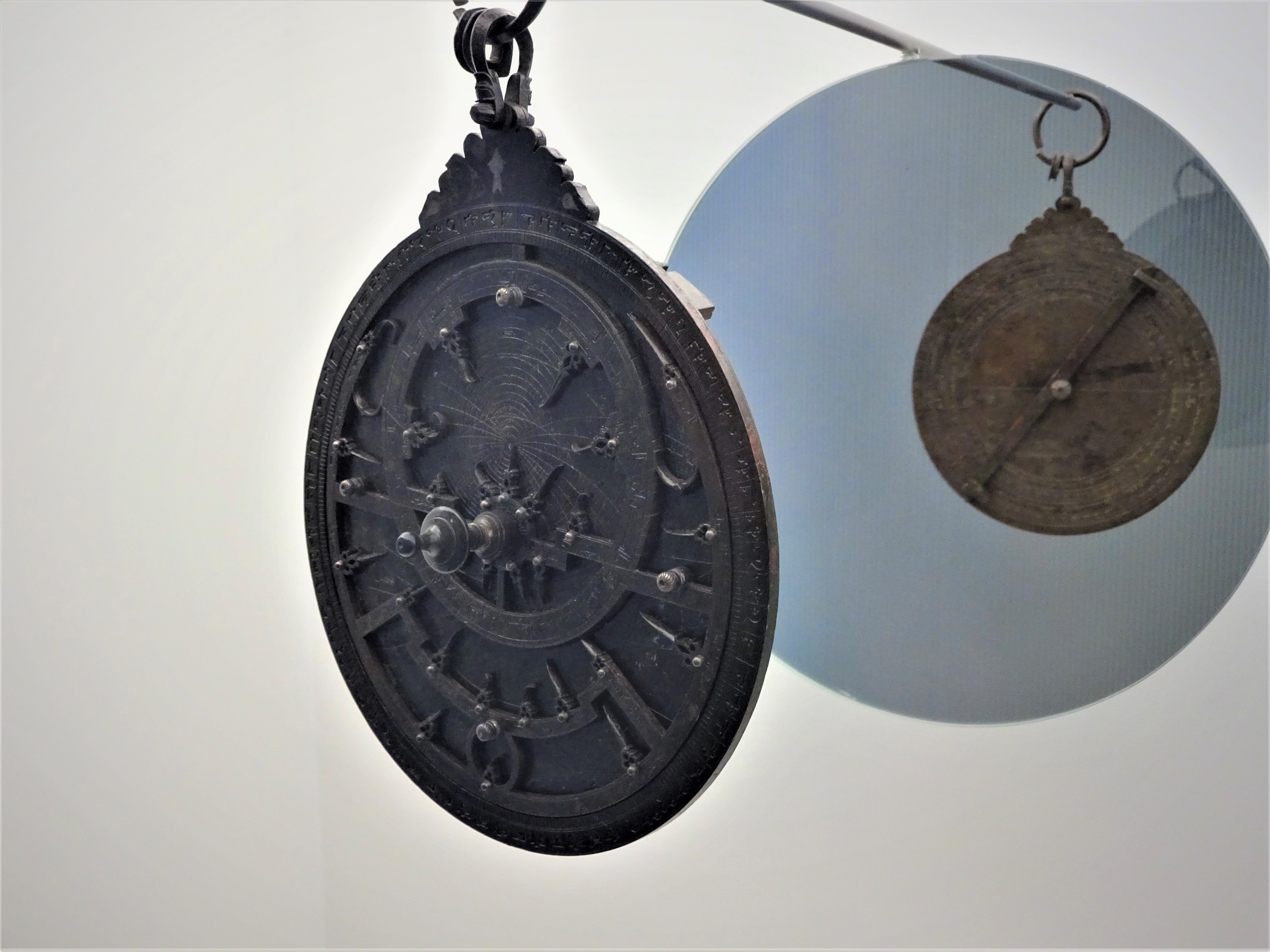 Astrolabium des Ibn Zawal im Archäologischen Museum Granada